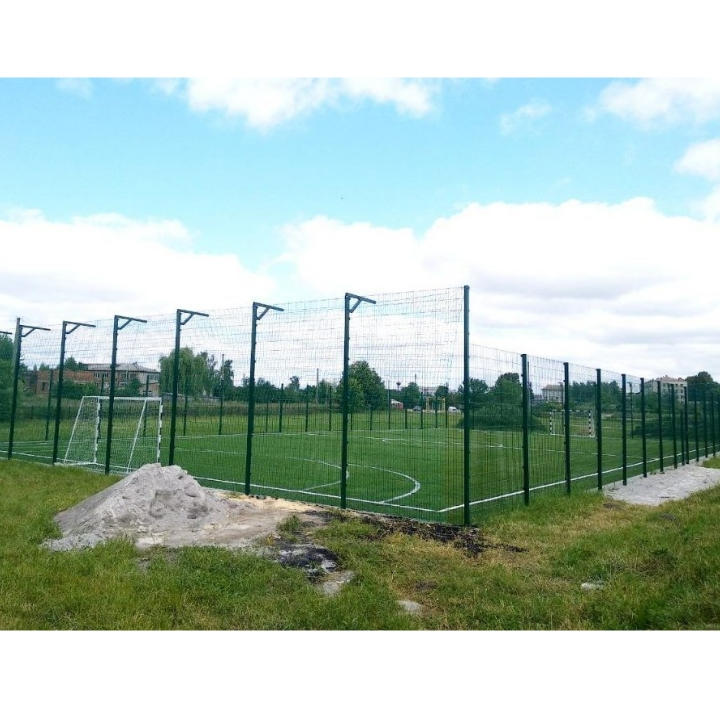 Фут